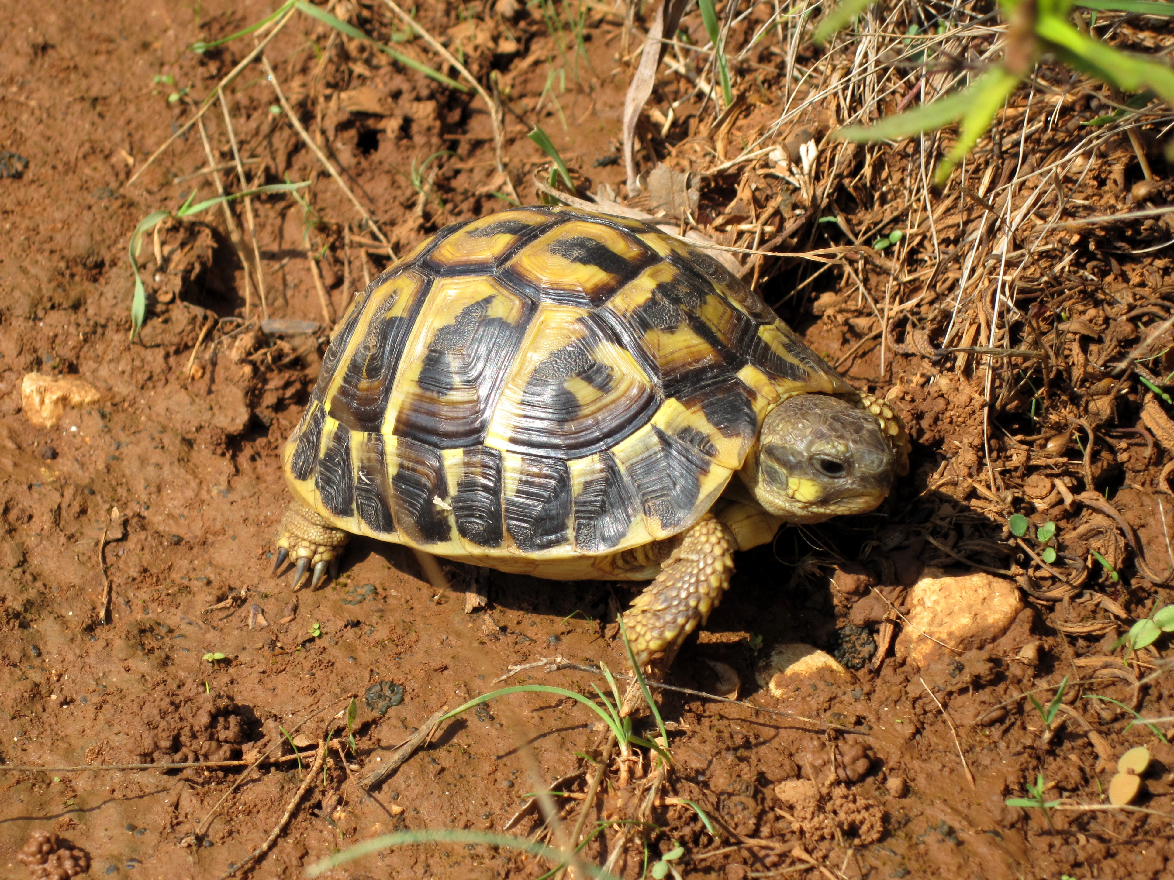 Griechische Landschildkröte (auch Mittelmeerschildkröte) nahe der Cala Petita bei Porto Cristo, Gemeinde Manacor, Mallorca, Spanien